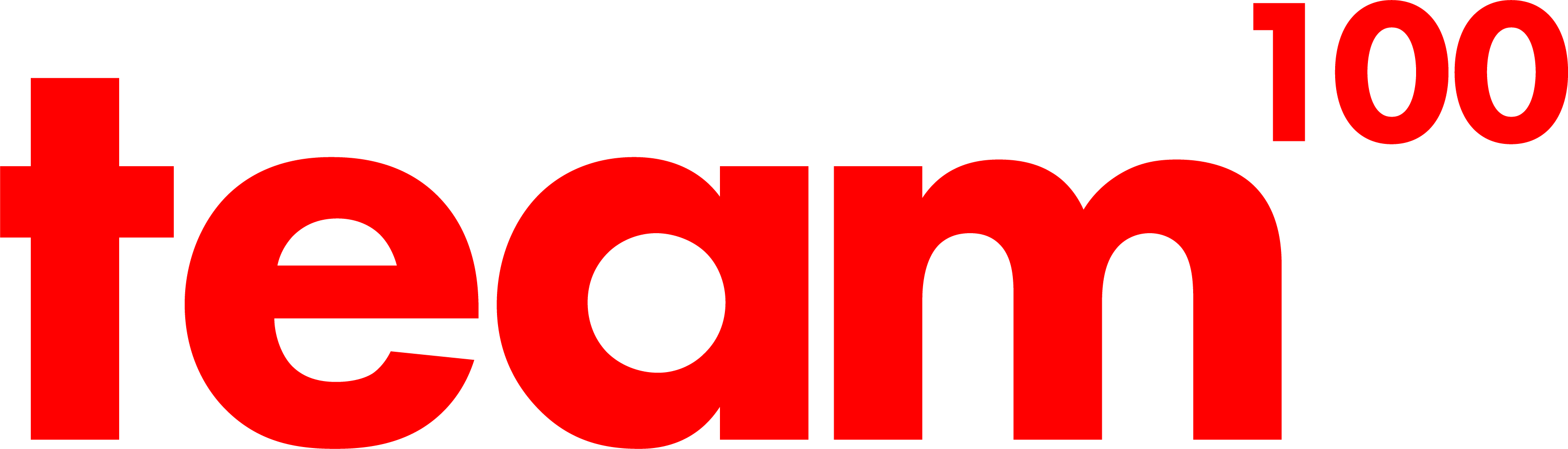 Logotyp Programu team100. Źródło: Ministerstwo Sport u Turystyki